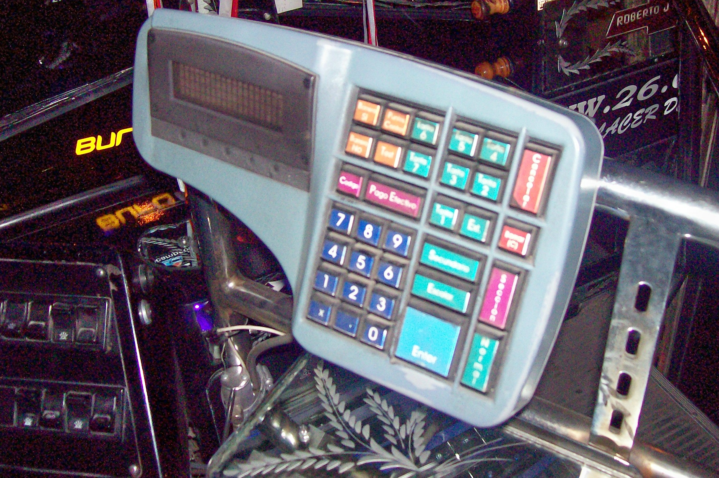 Máquina controladora del expendio de boletos de colectivo Buenos Aires, Argentina.